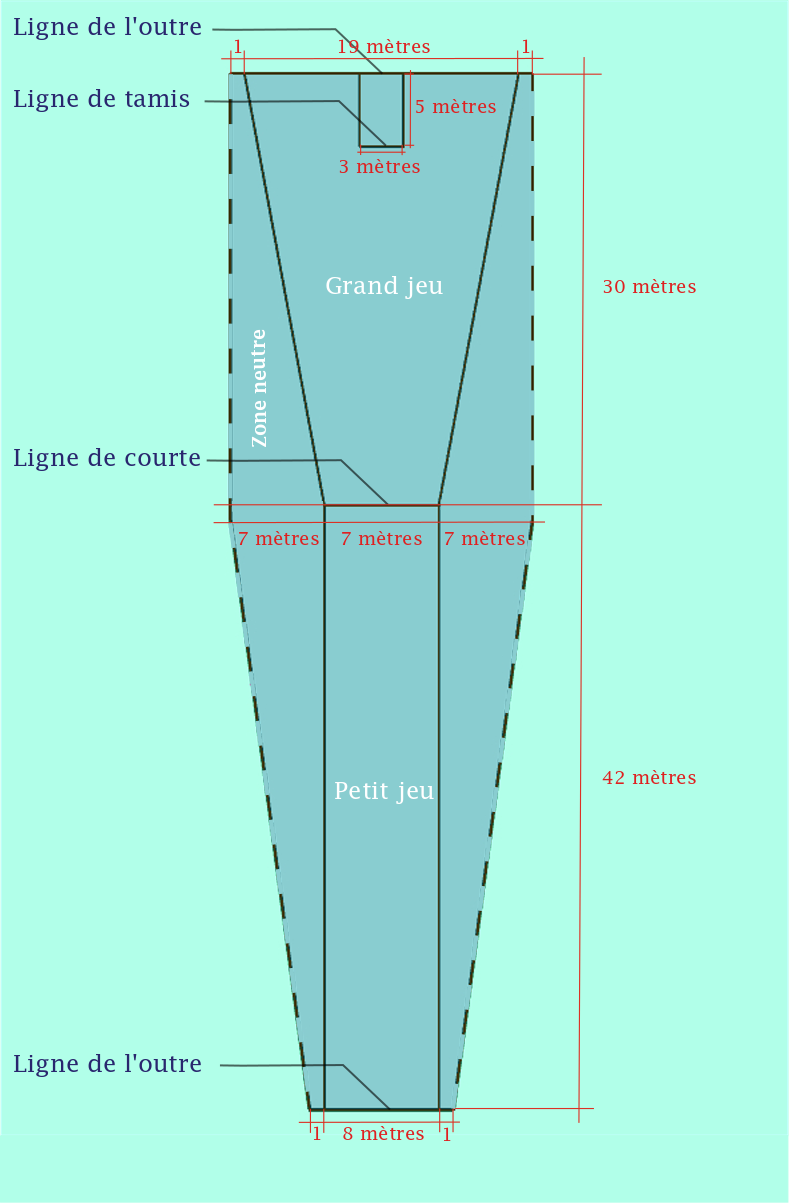 Dimension terrain de balle pelote